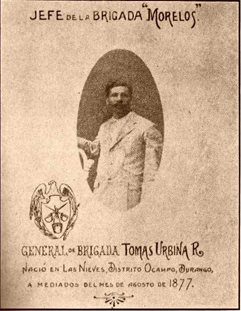 Gral. Tomas Urbina, jefe de la Brigada Morelos